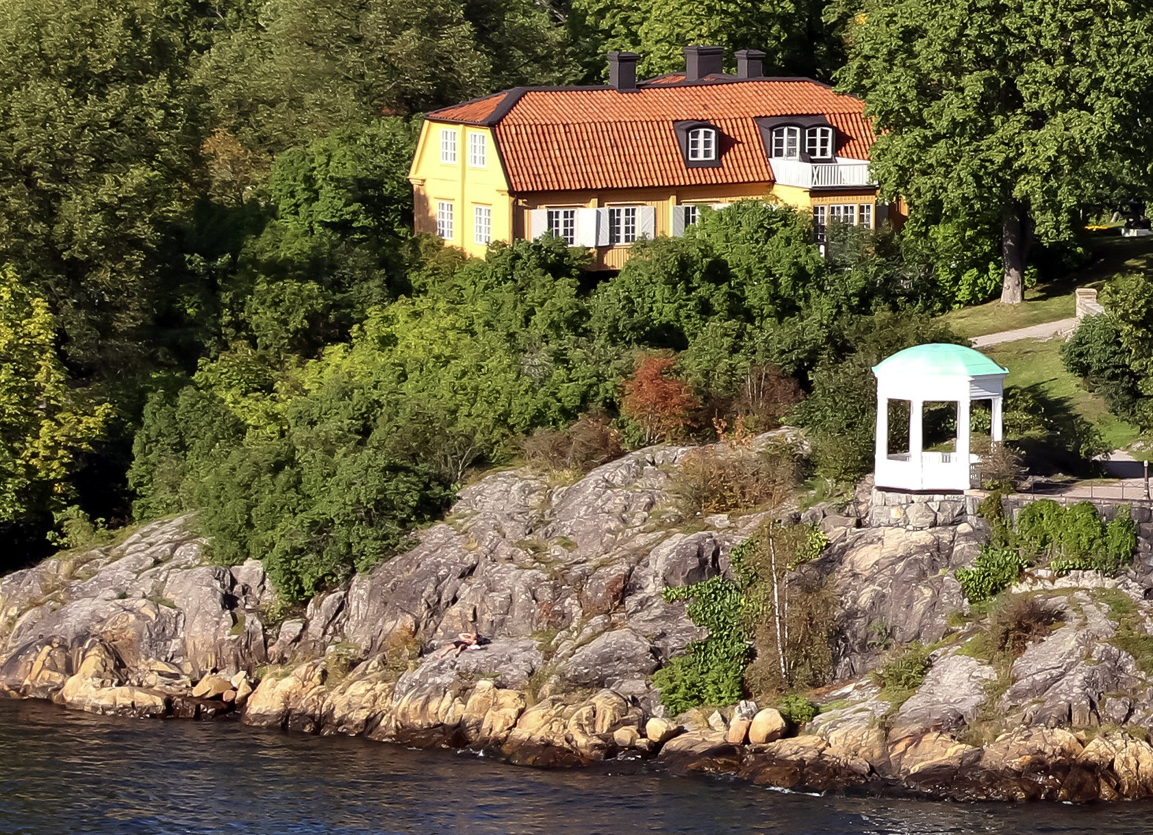 Gamla huset (eller Gula huset) på Waldemarsudde